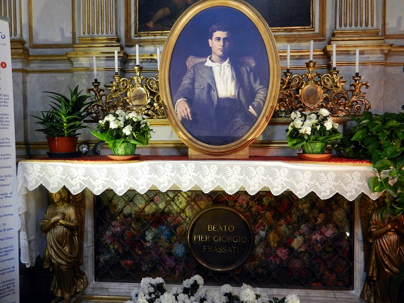 Torino - Tomba del B. Pier Giorgio Frassati all'interno del Duomo